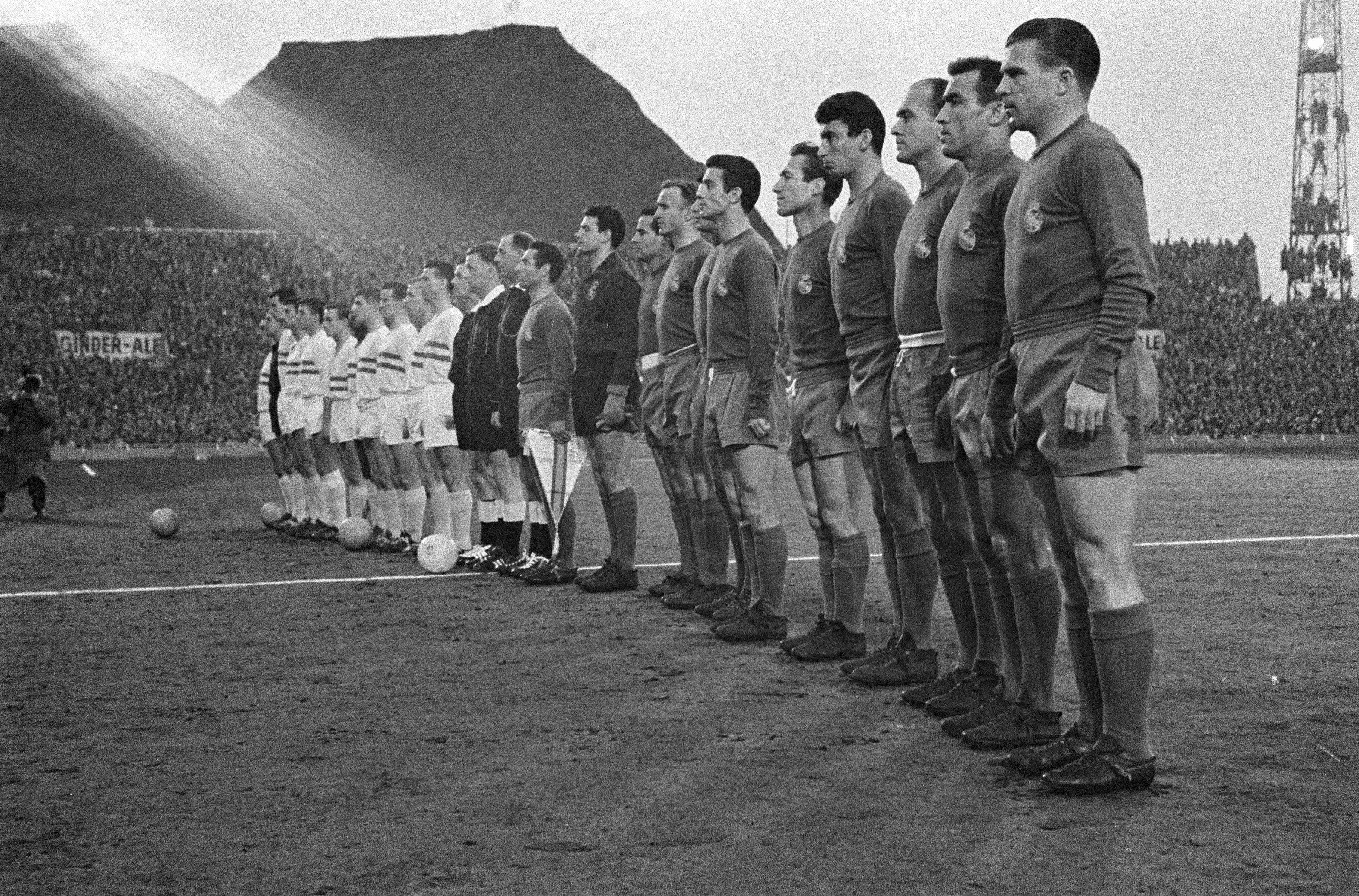 Collectie / Archief : Fotocollectie Anefo Reportage / Serie : [ onbekend ] Beschrijving : Standaard Luik tegen Real Madrid beide elftallen en Koning Boudewijn tijdens wedstrijd Datum : 12 april 1962 Trefwoorden : elftallen, sport, voetbal Persoonsnaam : Boudewijn, koning van België Instellingsnaam : Real Madrid, Standard Luik Fotograaf : Pot, Harry / Anefo Auteursrechthebbende : Nationaal Archief Materiaalsoort : Negatief (zwart/wit) Nummer archiefinventaris : bekijk toegang 2.24.01.05 Bestanddeelnummer : 913-7603